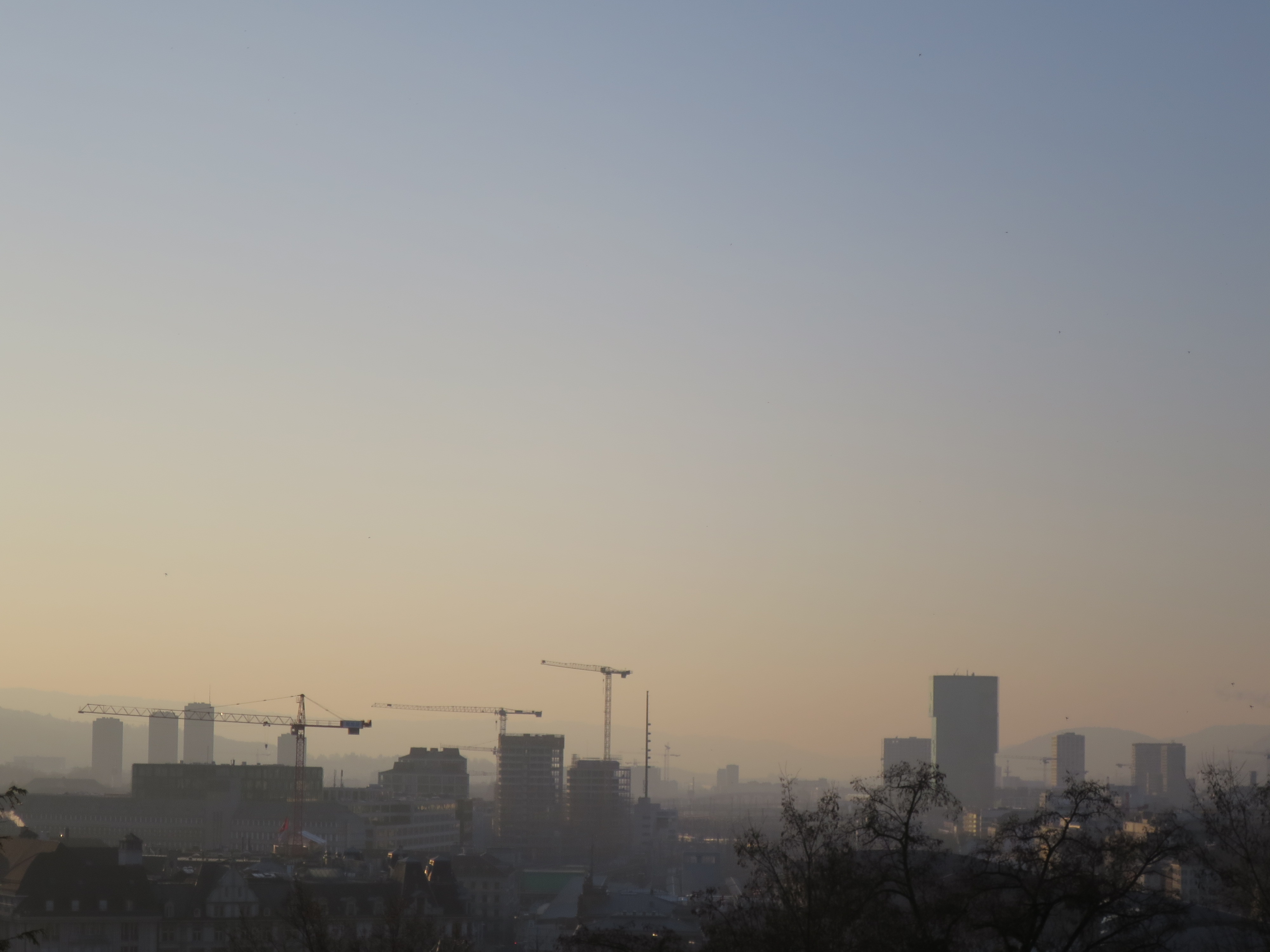 Die Skyline von Zürich in der Abendsonne